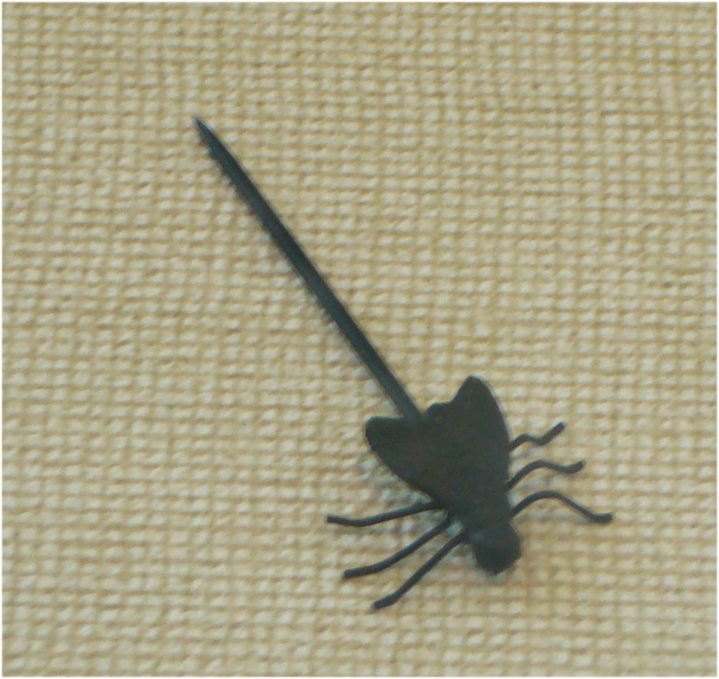 Anstecknadel Sayner Mücke in natürlicher Größe, Eisenkunstguß